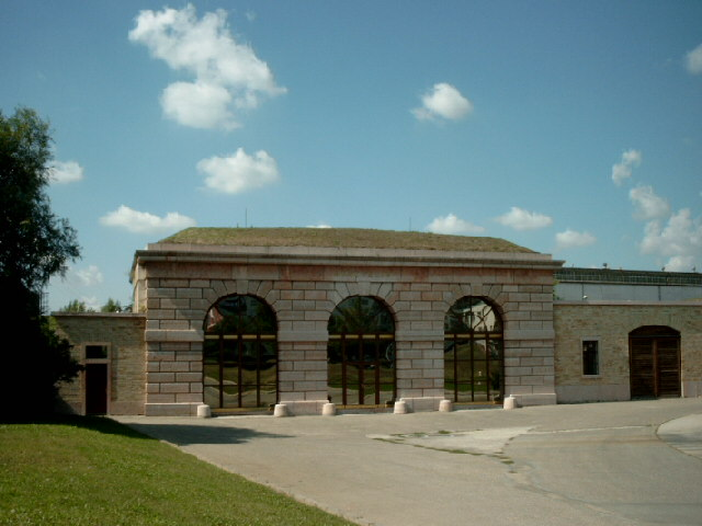 Bratislava Pordo en Komárno.